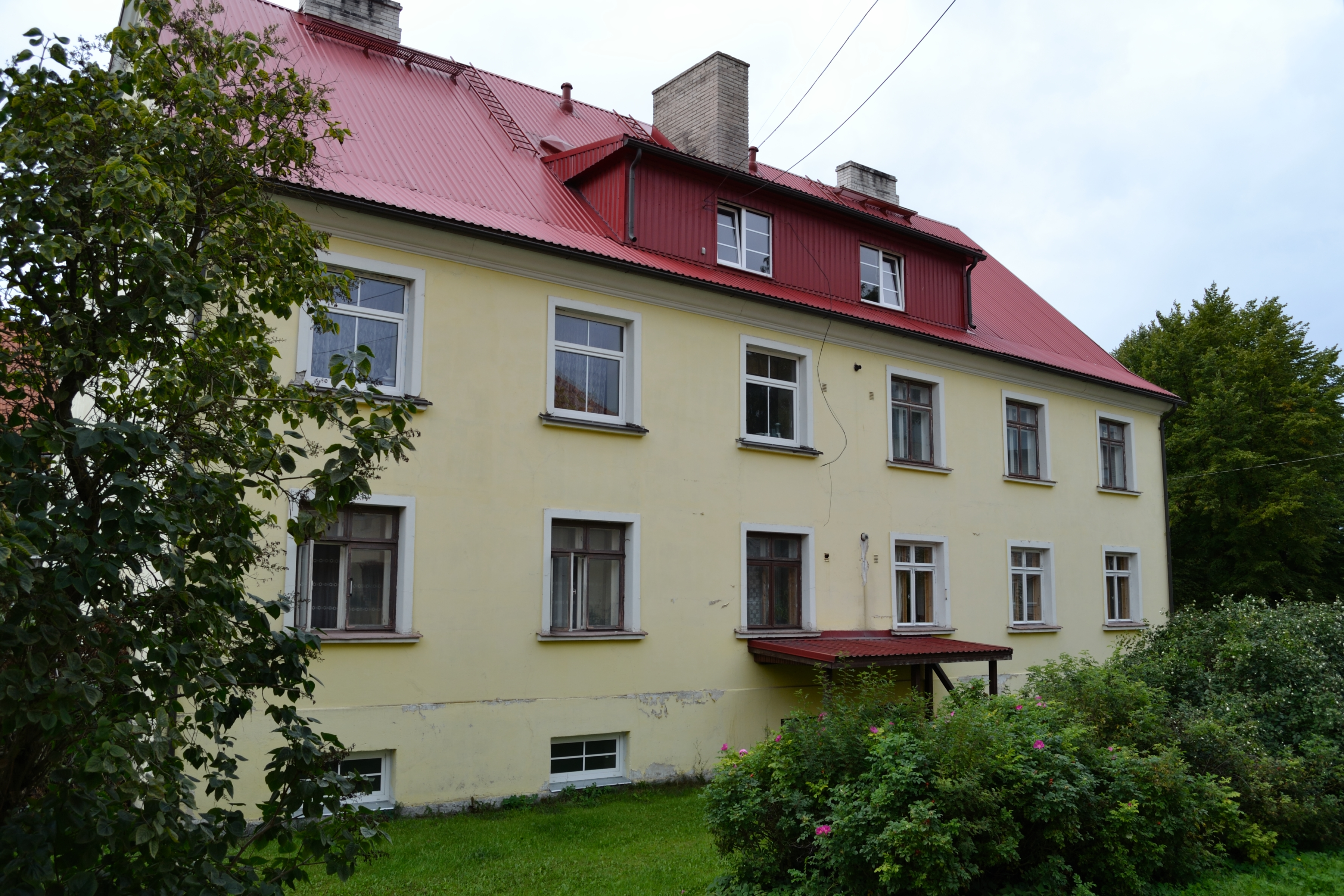 Tallinn, elamu Auna 5, 1929